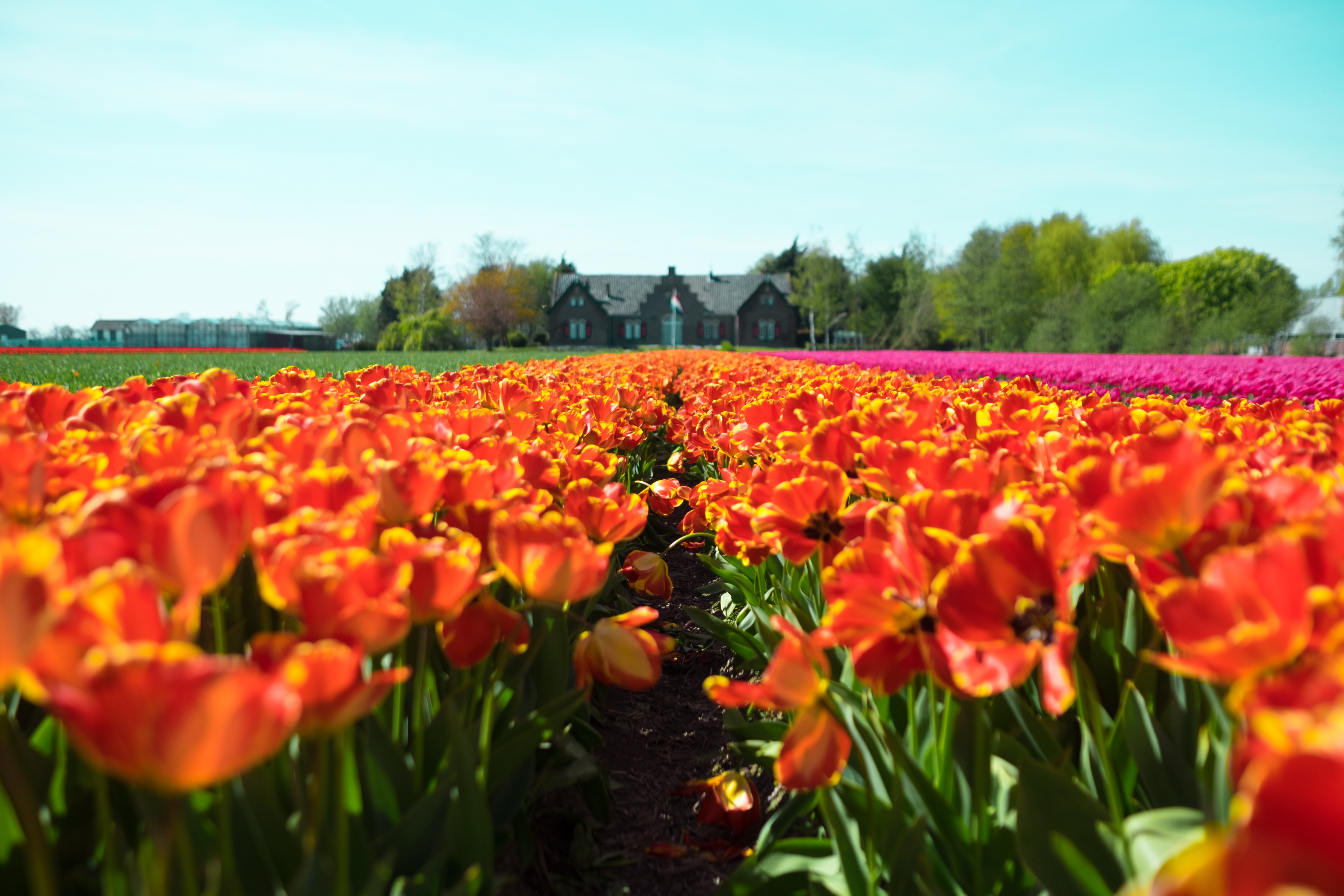 Flores em Lisse